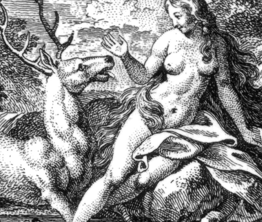 Illustration zu "Alboflede" aus Wielands "Dschinnistan" Kupferstich von J. Ch. Schellenberg von 1786